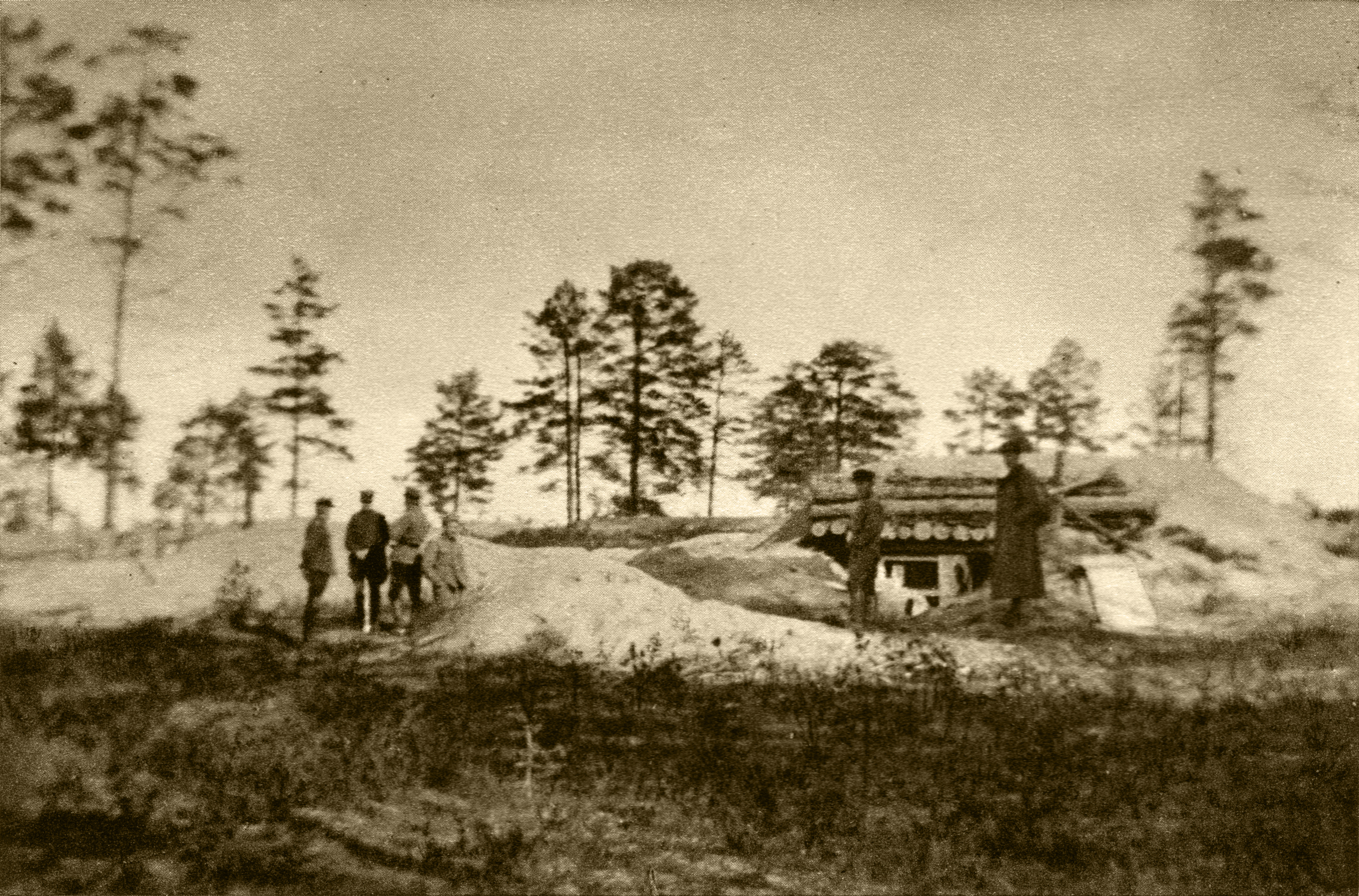 Ingeri polgu positsioone Peipija juures oktoobris 1919.